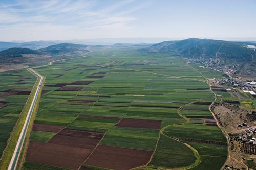 سهل البطوف